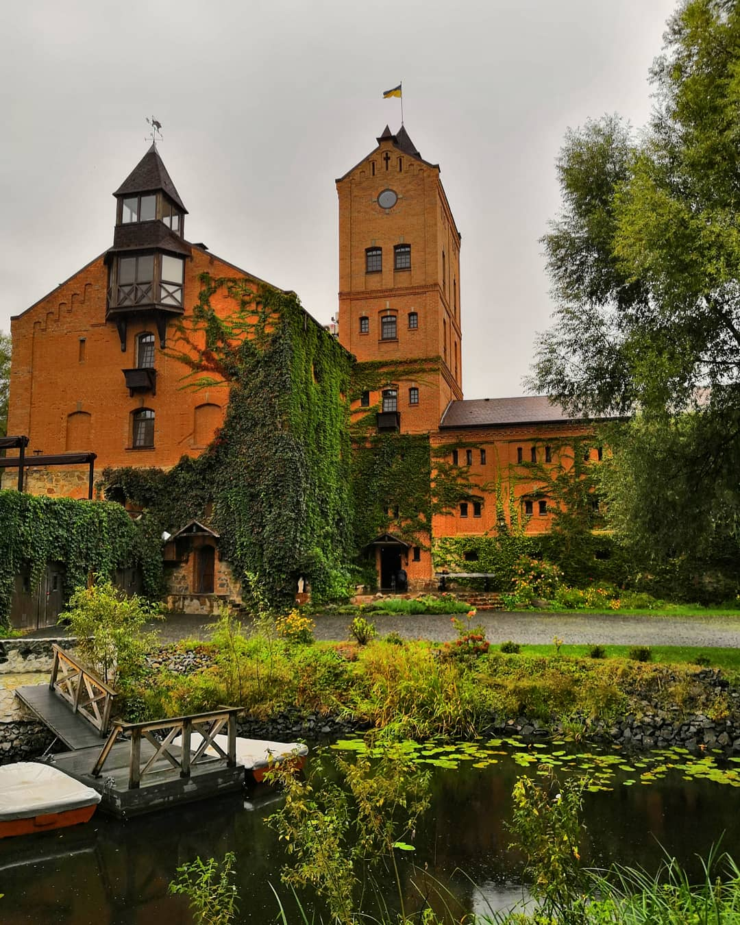 Замок Радомисль у Житомирській області